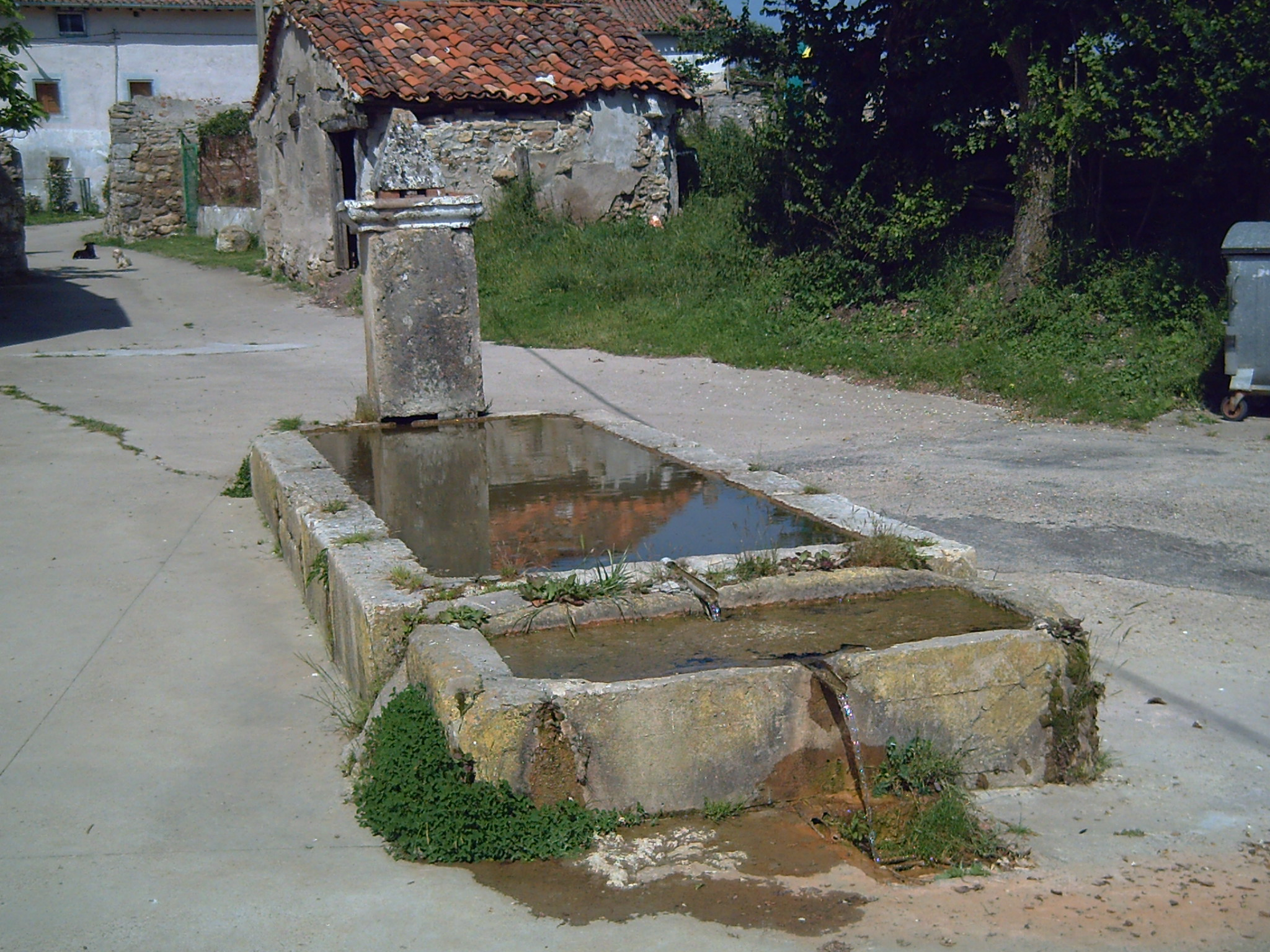 Fuente de Mozoncillo de Oca